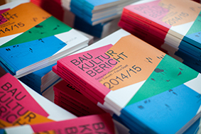 Der Baukulturbericht 2014/15